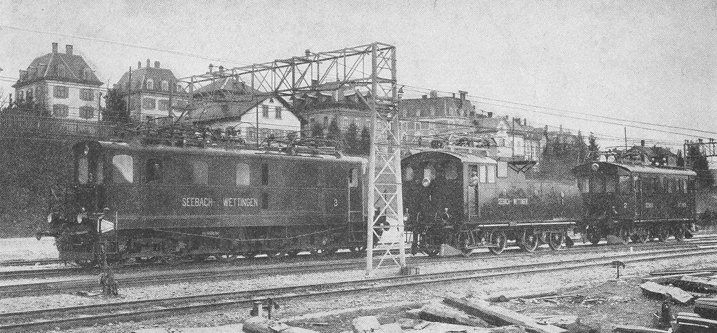 Versuchsbetrieb Seebach-Wettingen: Die Lokomotiven Nr. 3, 1 und 2 (von links nach rechts)